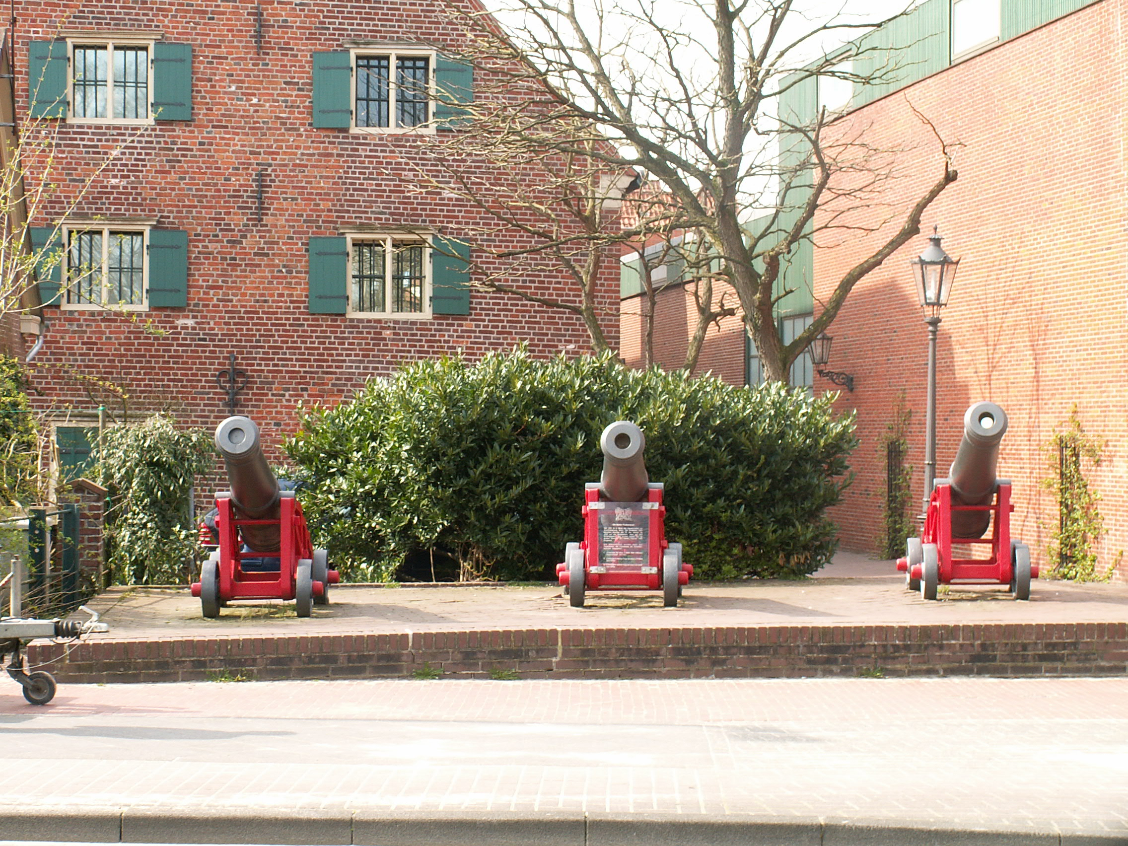 Die Stader Flutkanonen dienten zum Signalschießen bei Hochwasser.